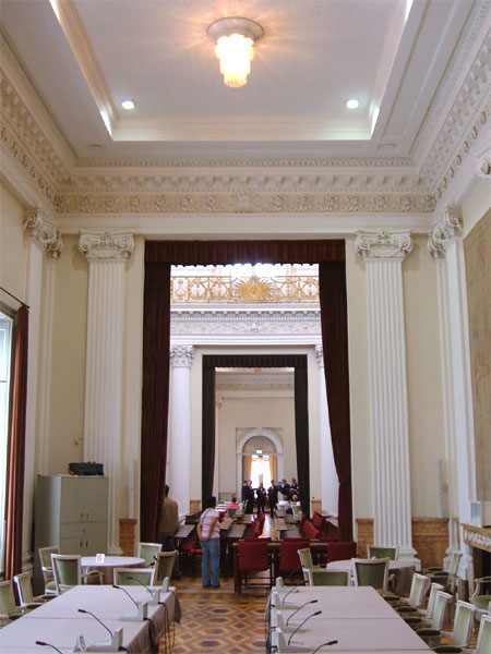 Provinciehuis te Haarlem.